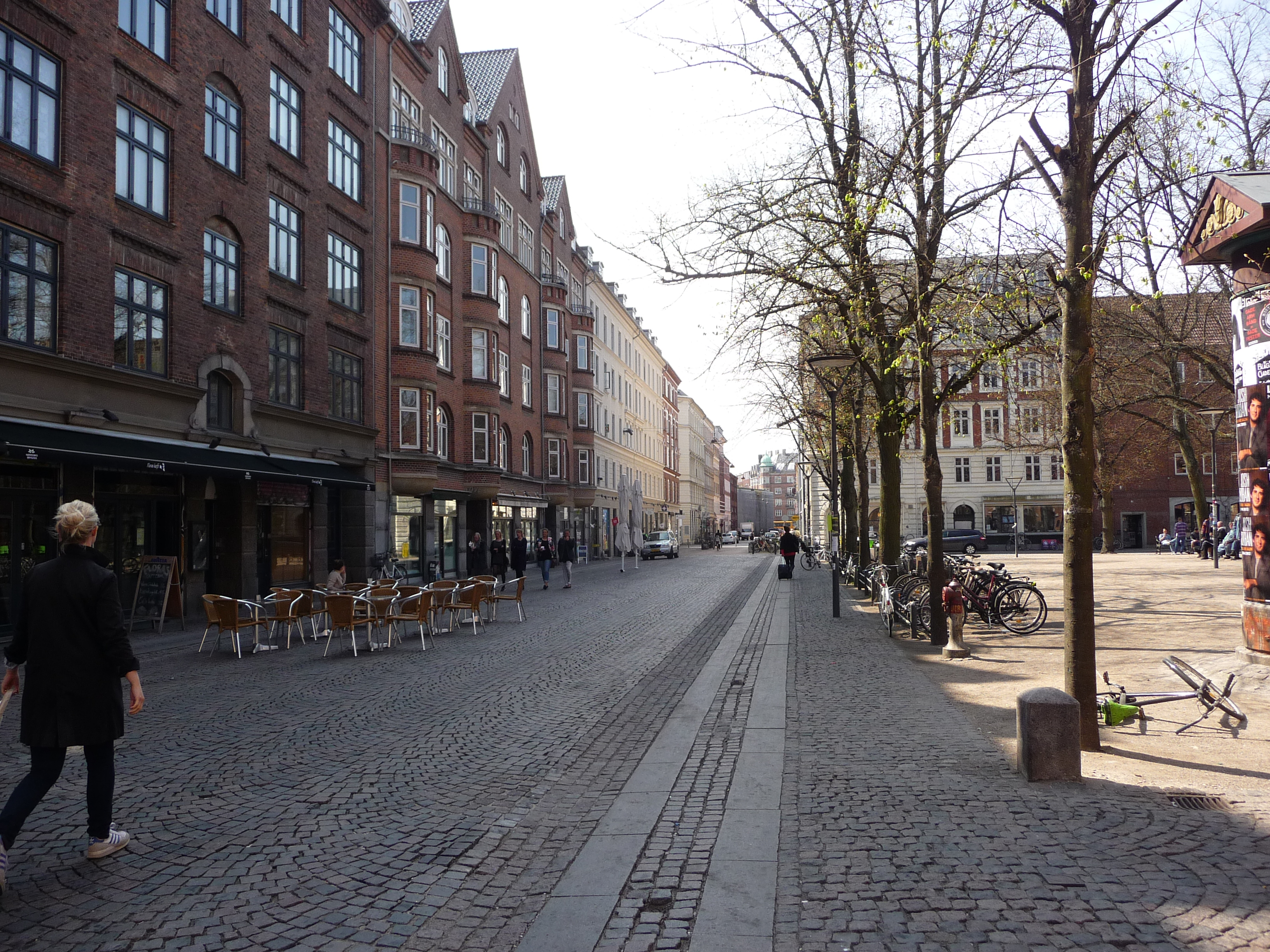 Blågårdsgade in Nørrebro, Copenahgen, Denmark